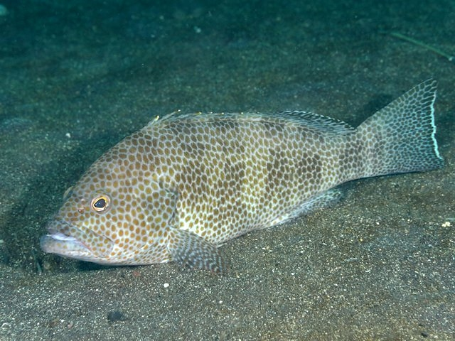 オオモンハタ Epinephelus areolatus